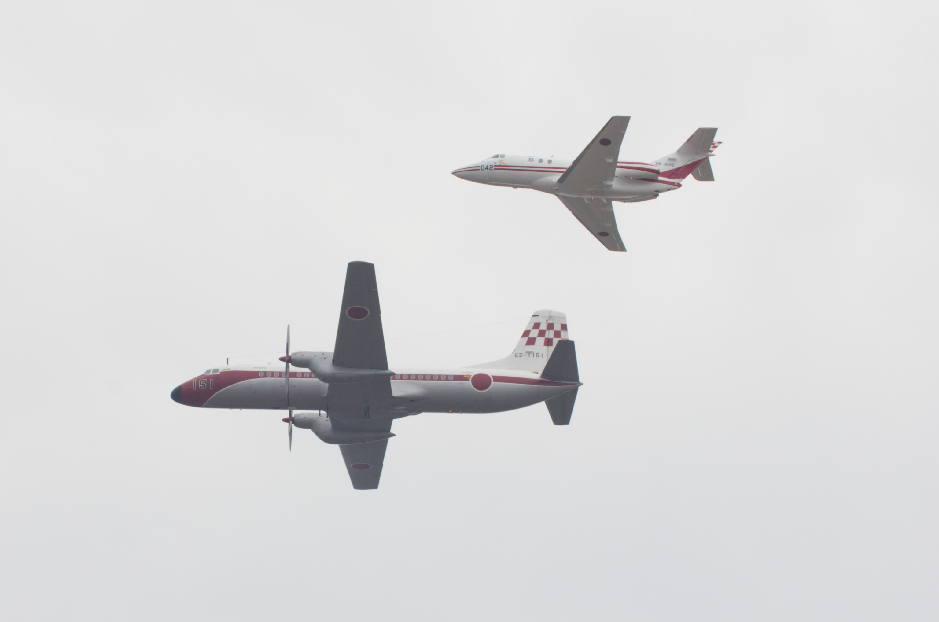 航空自衛隊航空支援集団 飛行点検隊 YS-11とU-125、2011年入間基地航空祭で撮影。